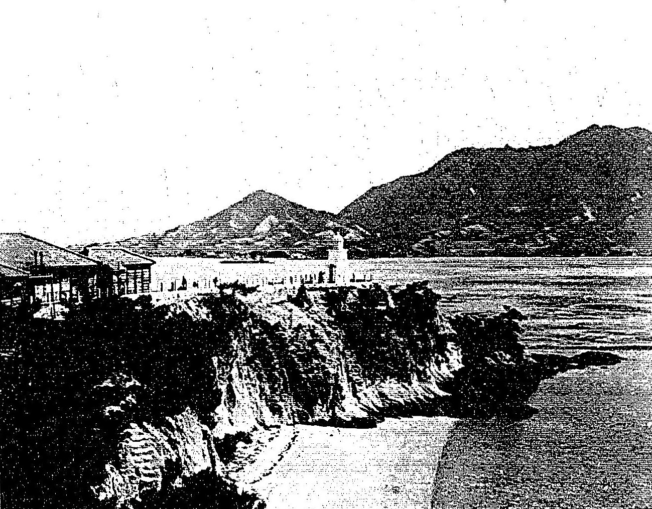 1904年発行資料での大久野島灯台